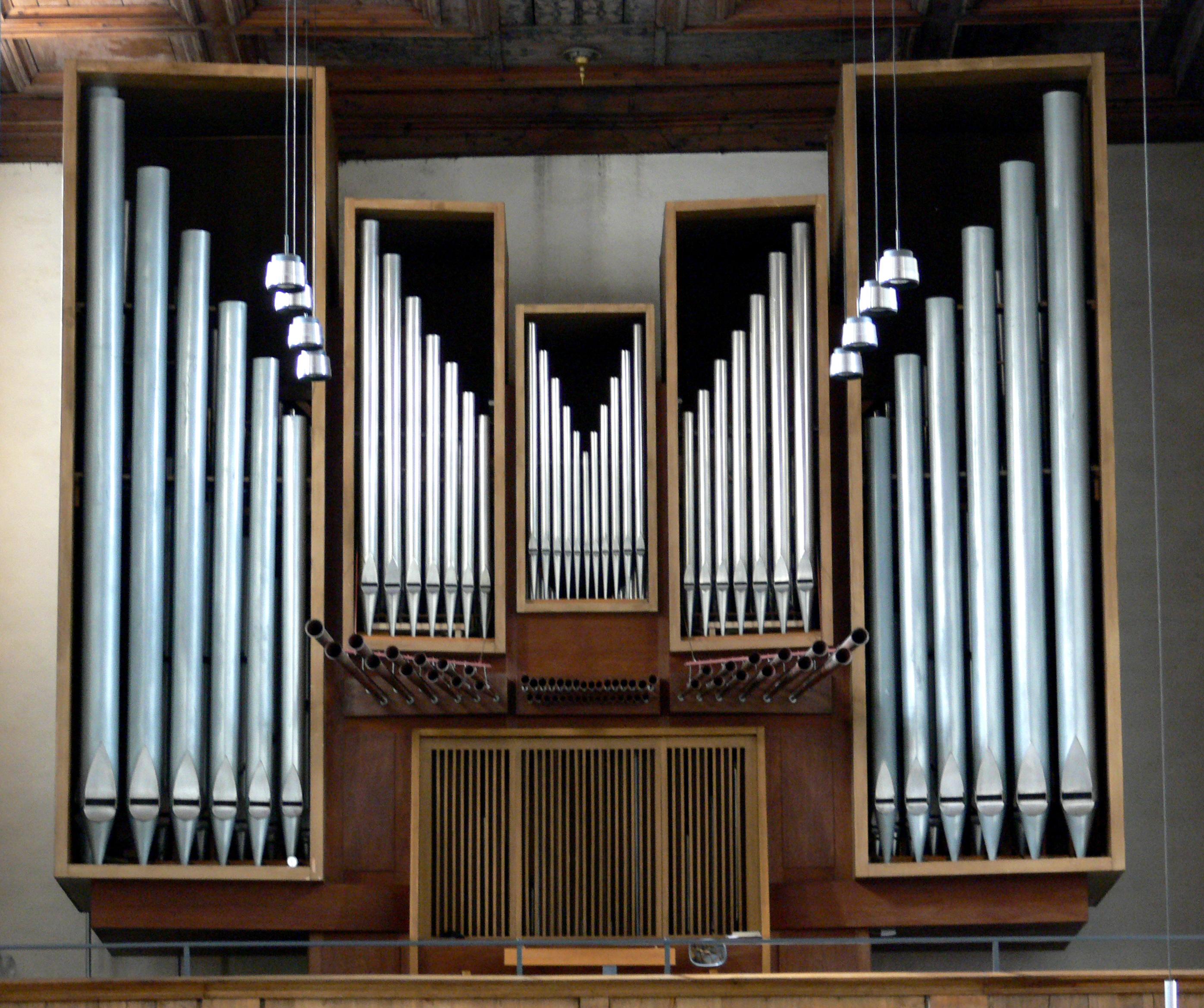 Isny im Allgäu, Nikolaikirche, Orgelprospekt